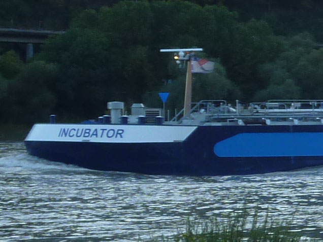 Blauer Kegel auf einem Tankschiff